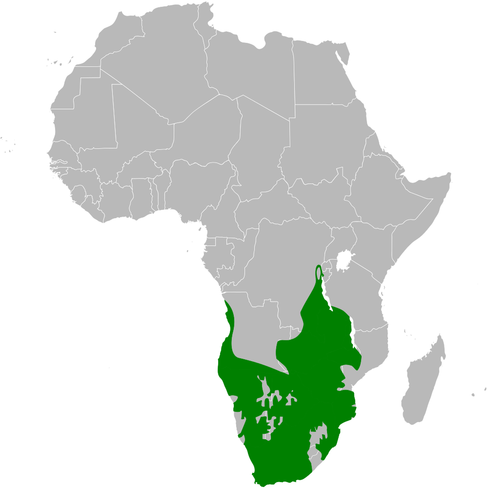 Sylvietta rufescens distribution map, based on